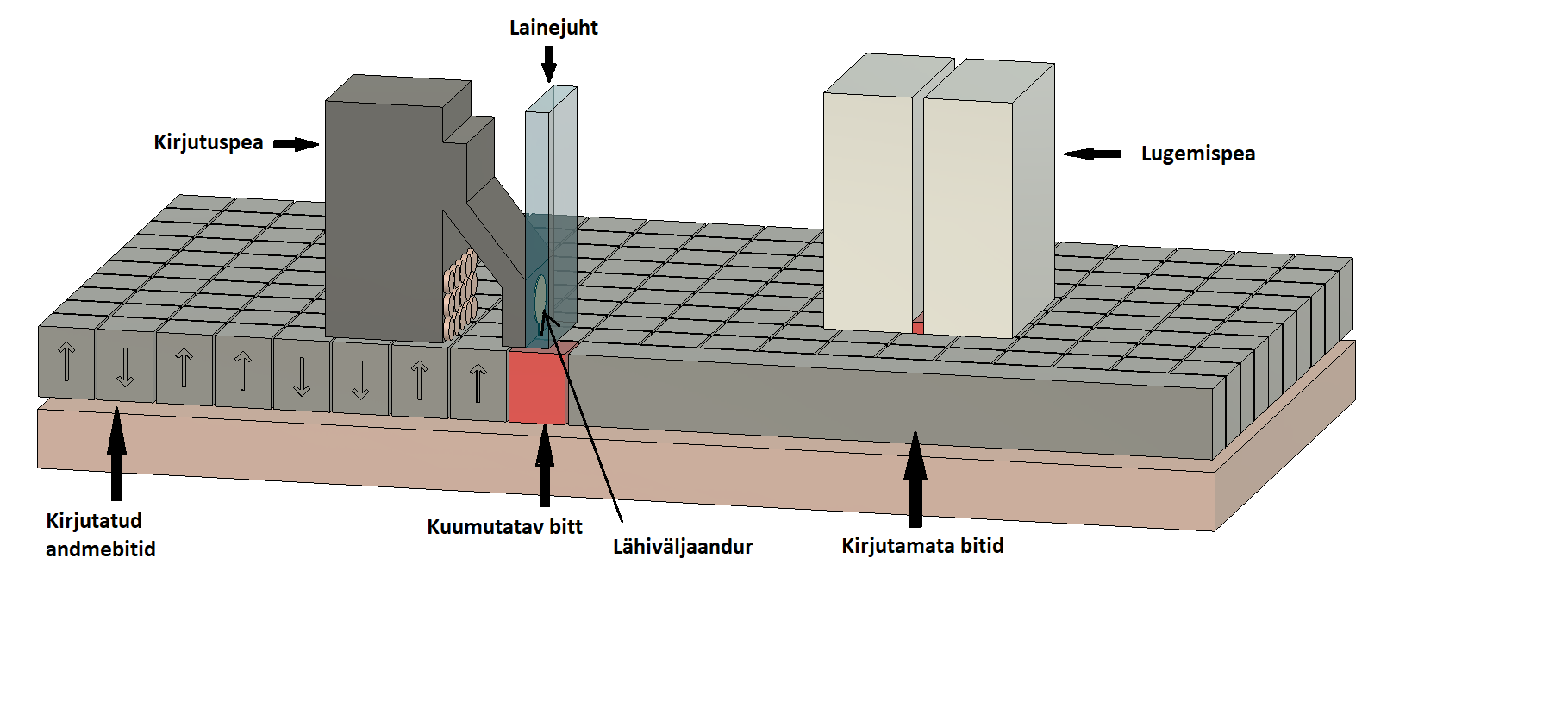 Soojusabistatud magnetsalvestuse tehnoloogia abil biti salvestamine. Kirjutus- ja lugemispea ehitus.